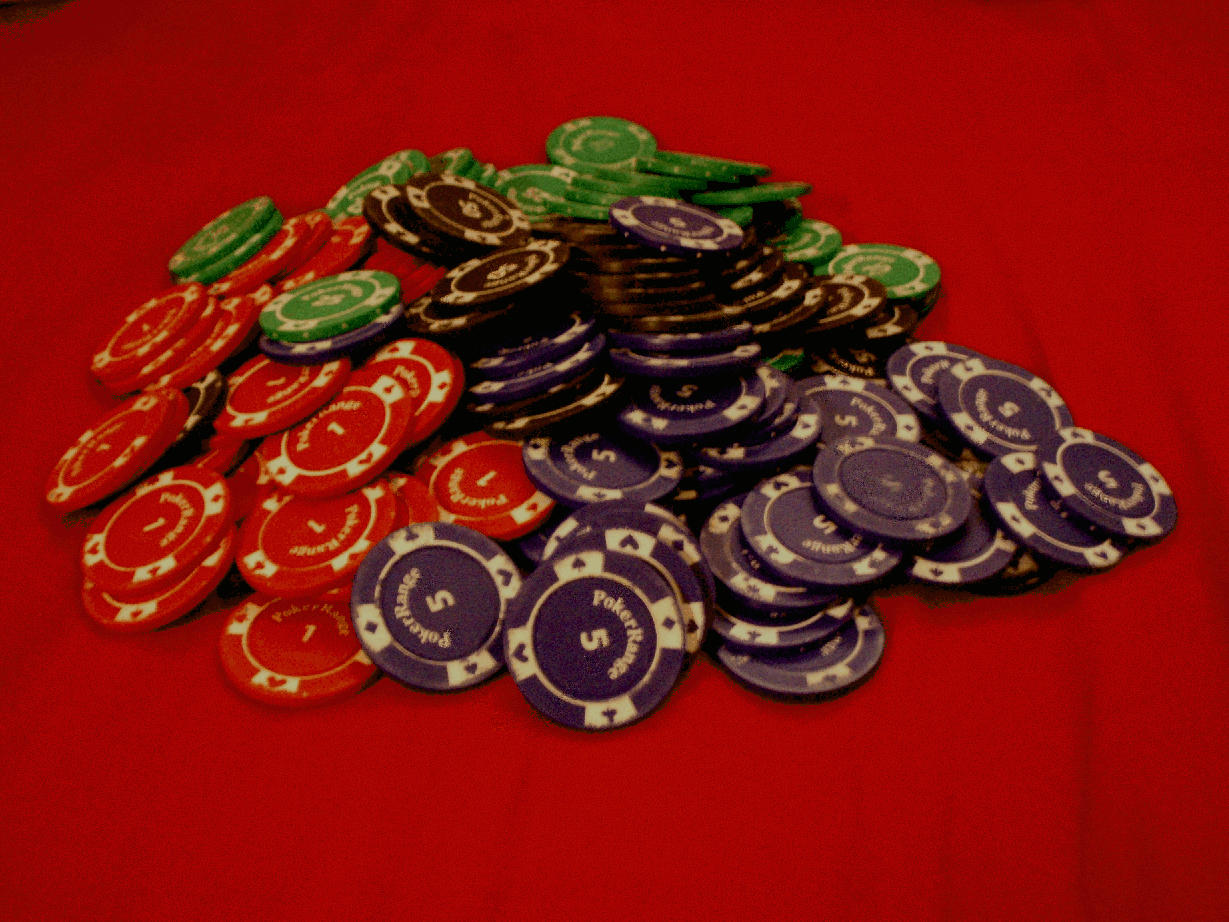 Ein Pot (symbolisch)